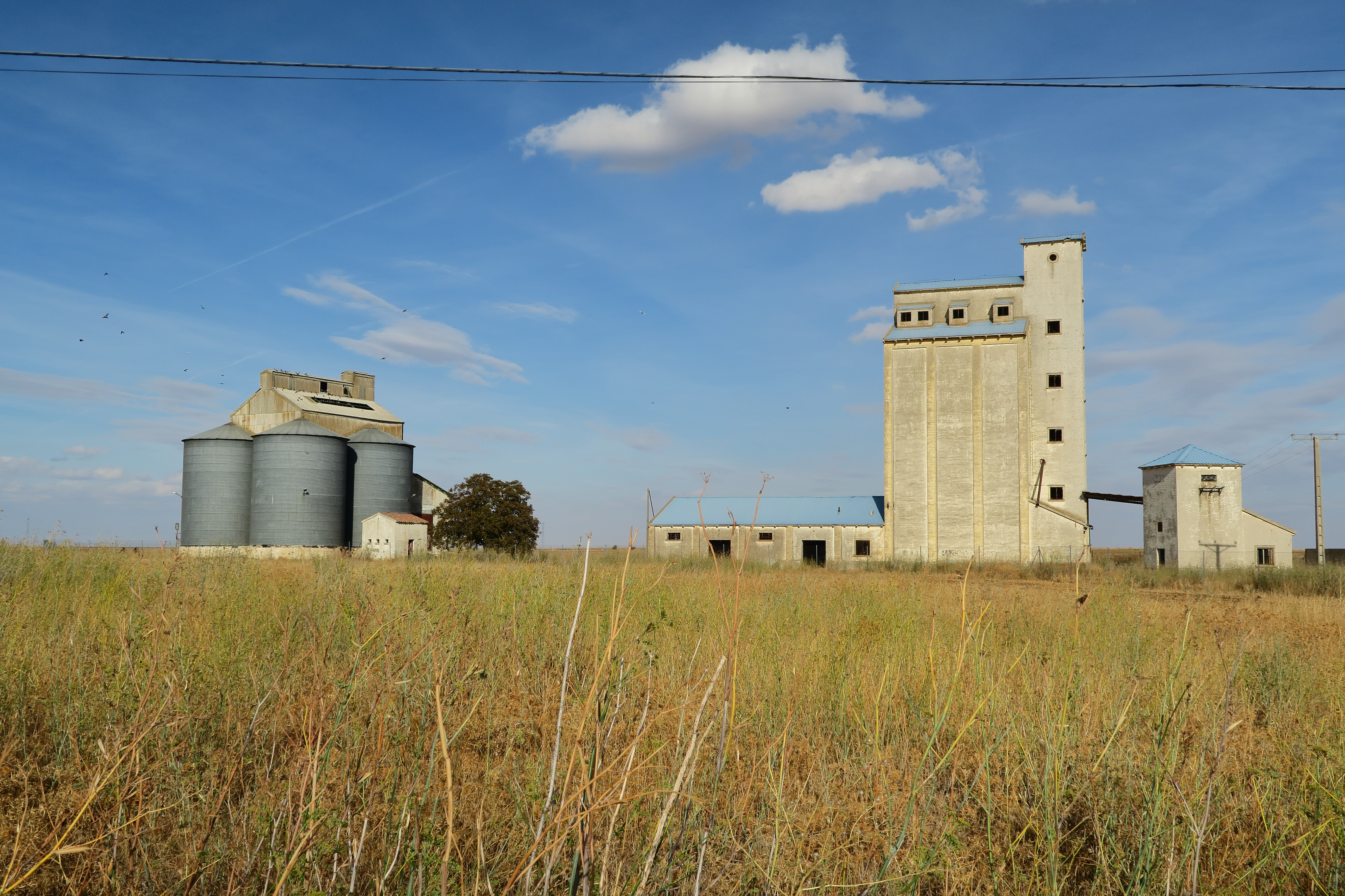 Piedrahíta de Castro, silos